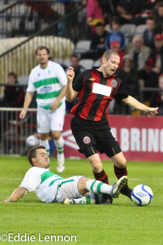 Bohemians V Olimpija Ljubljana (31 of 37)